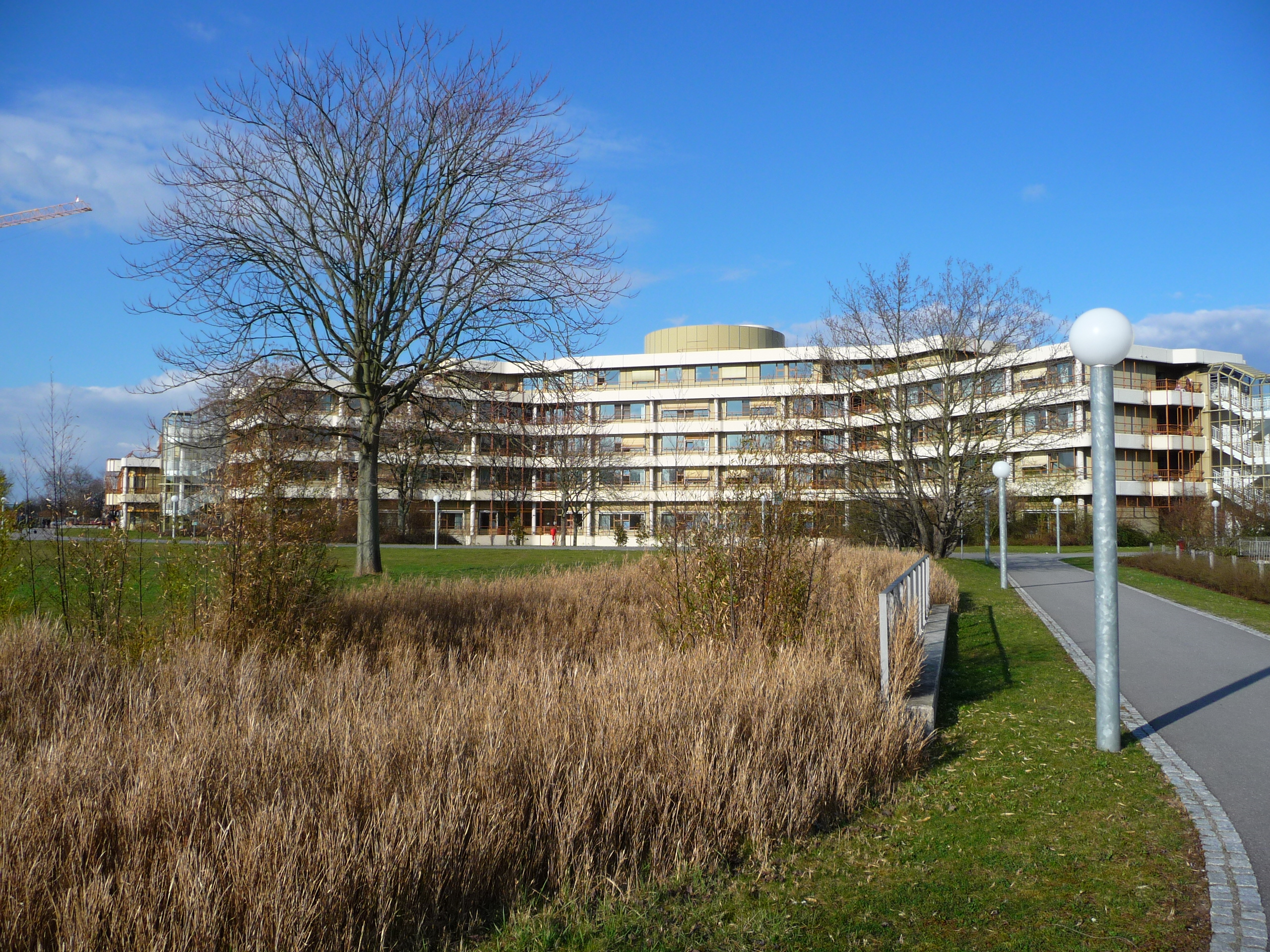 Rückwärtige Ansicht der Kopfklinik des Universitätsklinikums in Heidelberg